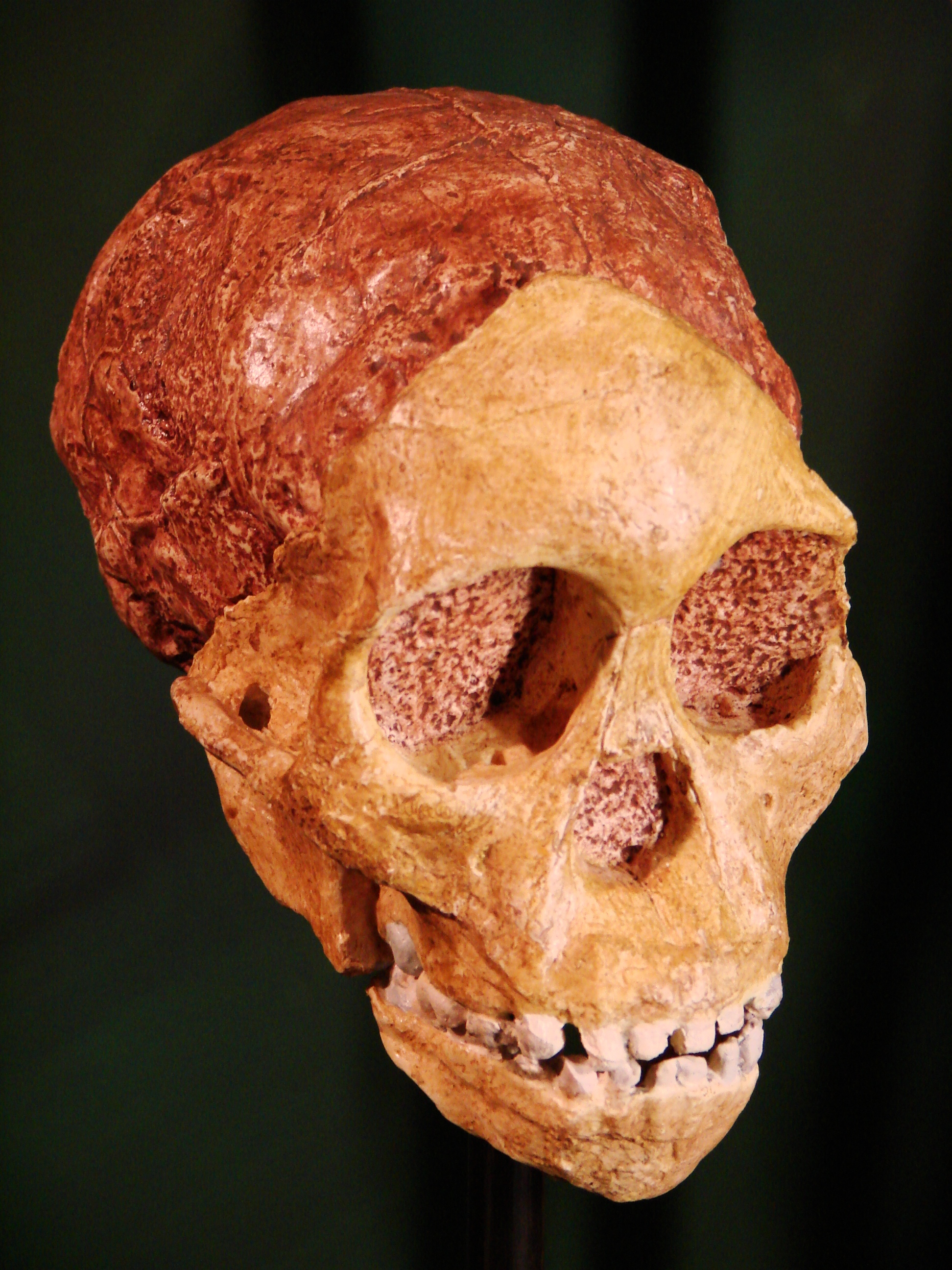 Muséum d'Anthropologie, campus universitaire d'Irchel, Université de Zurich (Suisse) : Australopithecus africanus , enfant de Taung (Taung, Afrique du sud)